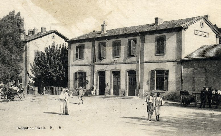 Première gare sntf Orélansville